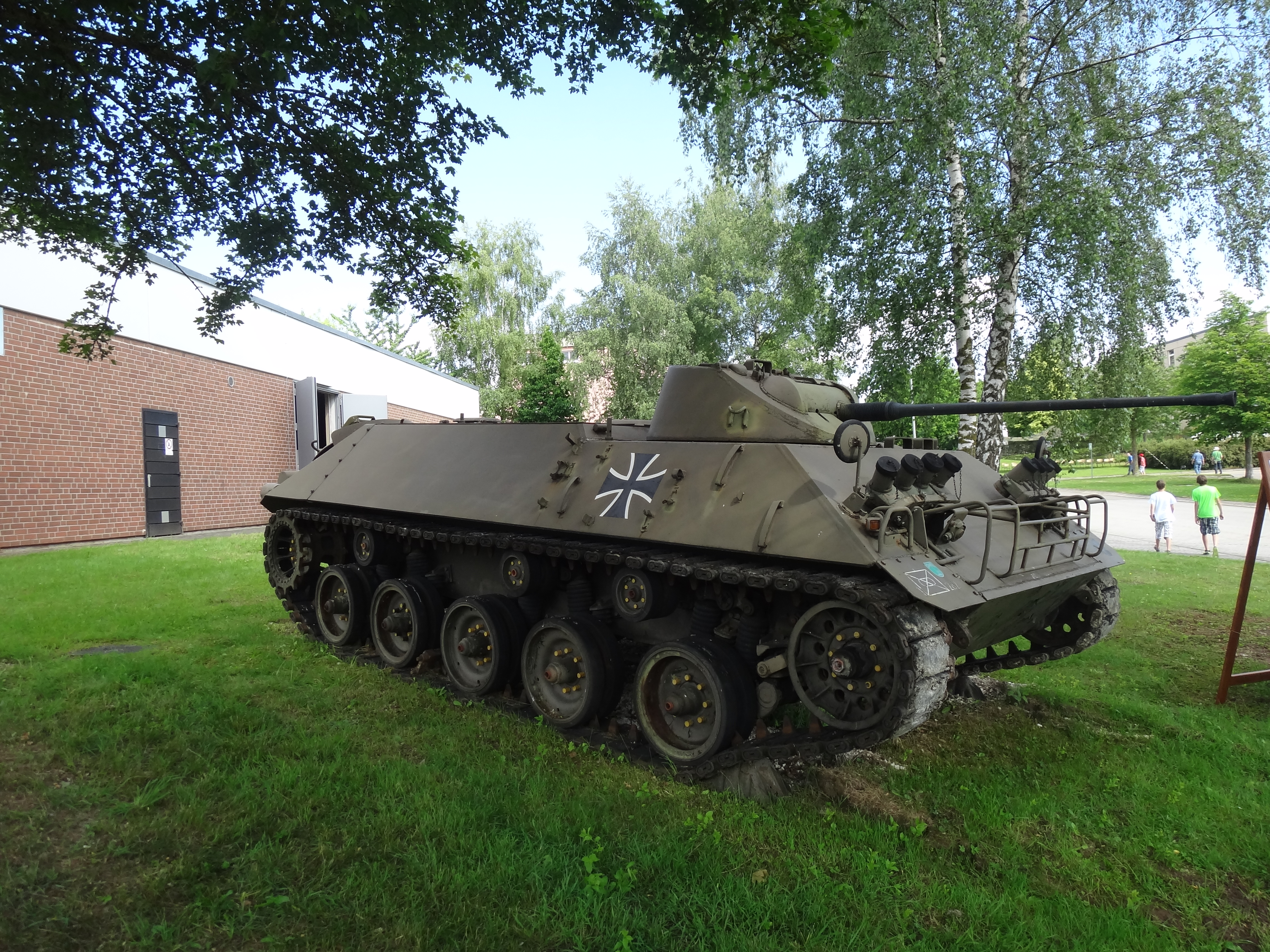 HS 30 Schützenpanzer lang 2012-06-23